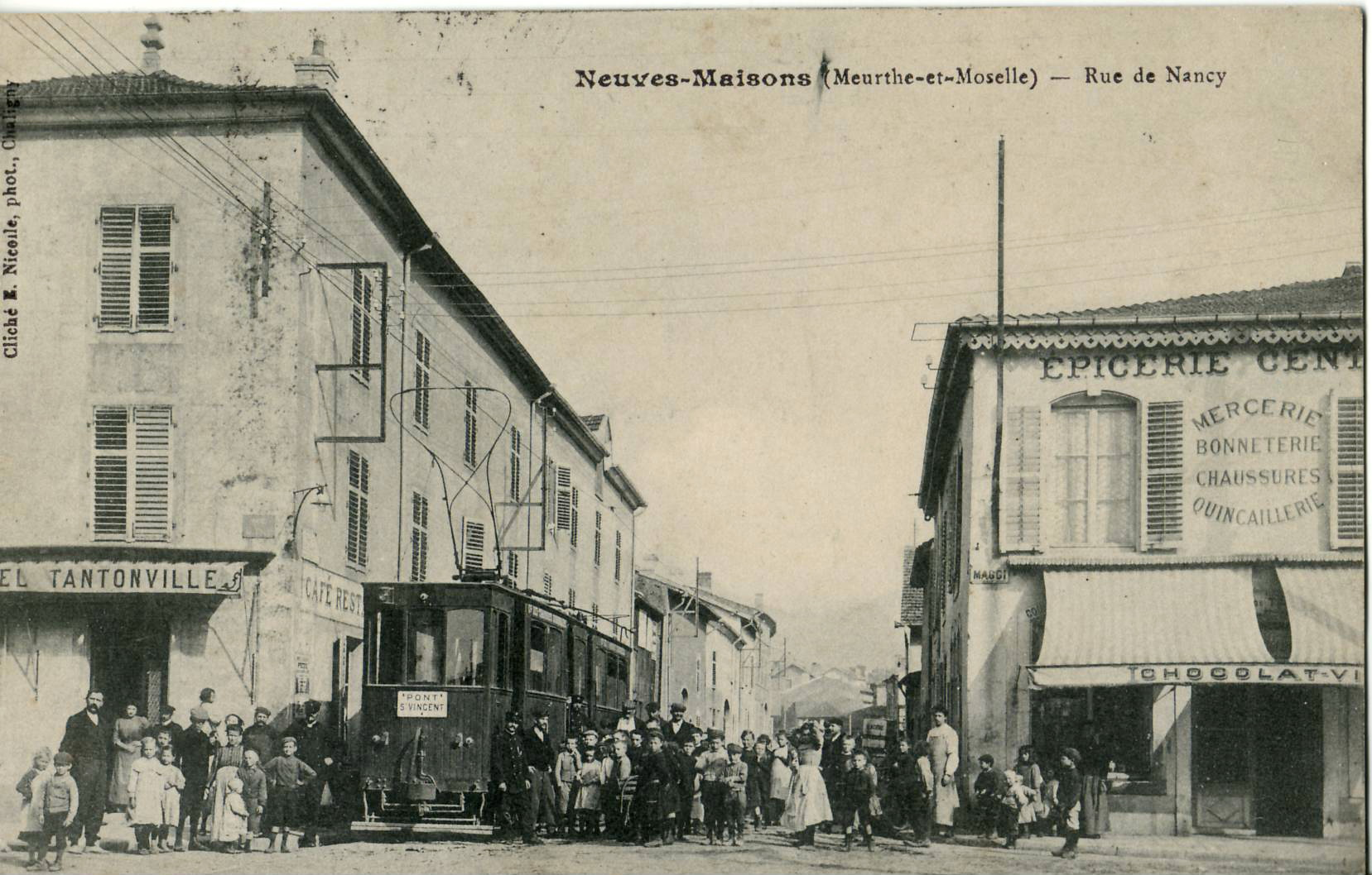 Carte postale ancienne éditée par Nicolle : NEUVES-MAISONS - Rue de Nancy